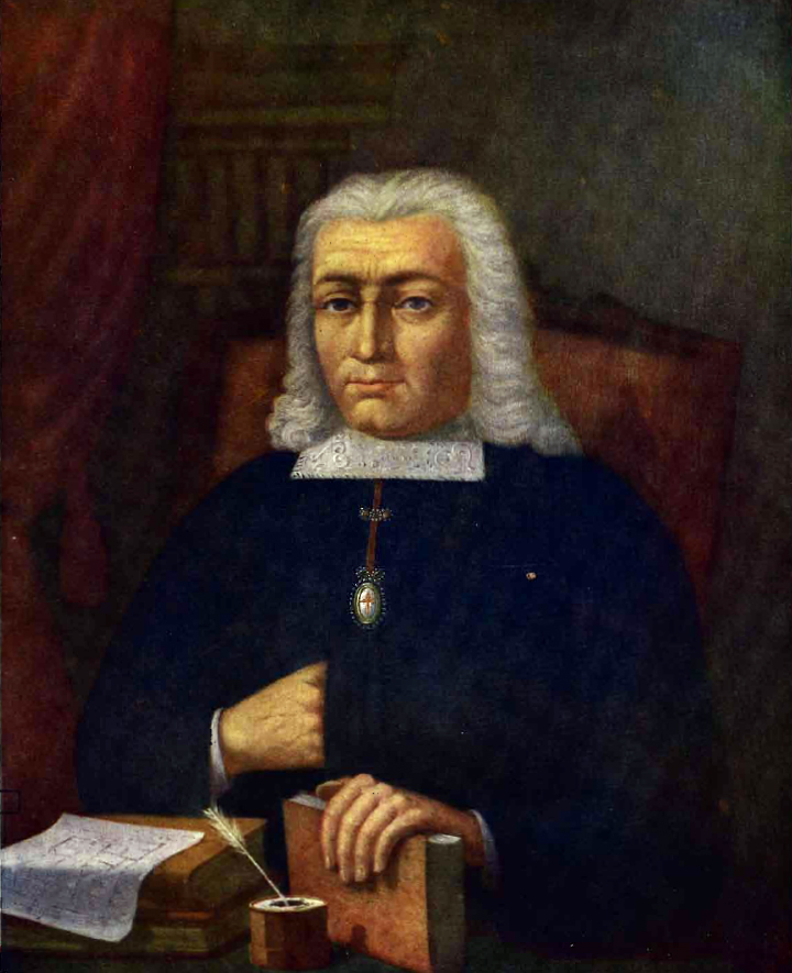 José Tomás Ruiz de Azúa. Nace en Ulibarri Gamboa, Álava, España, en 1699 y muere en Santiago de Chile, en 1731. Se casó en la ciudad de Santiago, con María de Amasa Yturgoyen, hija de Pedro de Amasa y Catalina Lisperguer. Llegó a Santiago, Chile, por 1696, nombrado Regidor de la ciudad en 1698, fue Gobernador del Puerto de Valparaíso en 1706, ya en 1708 alcanza el Grado Militar de Maestre de Campo, General, del Reino de Chile.